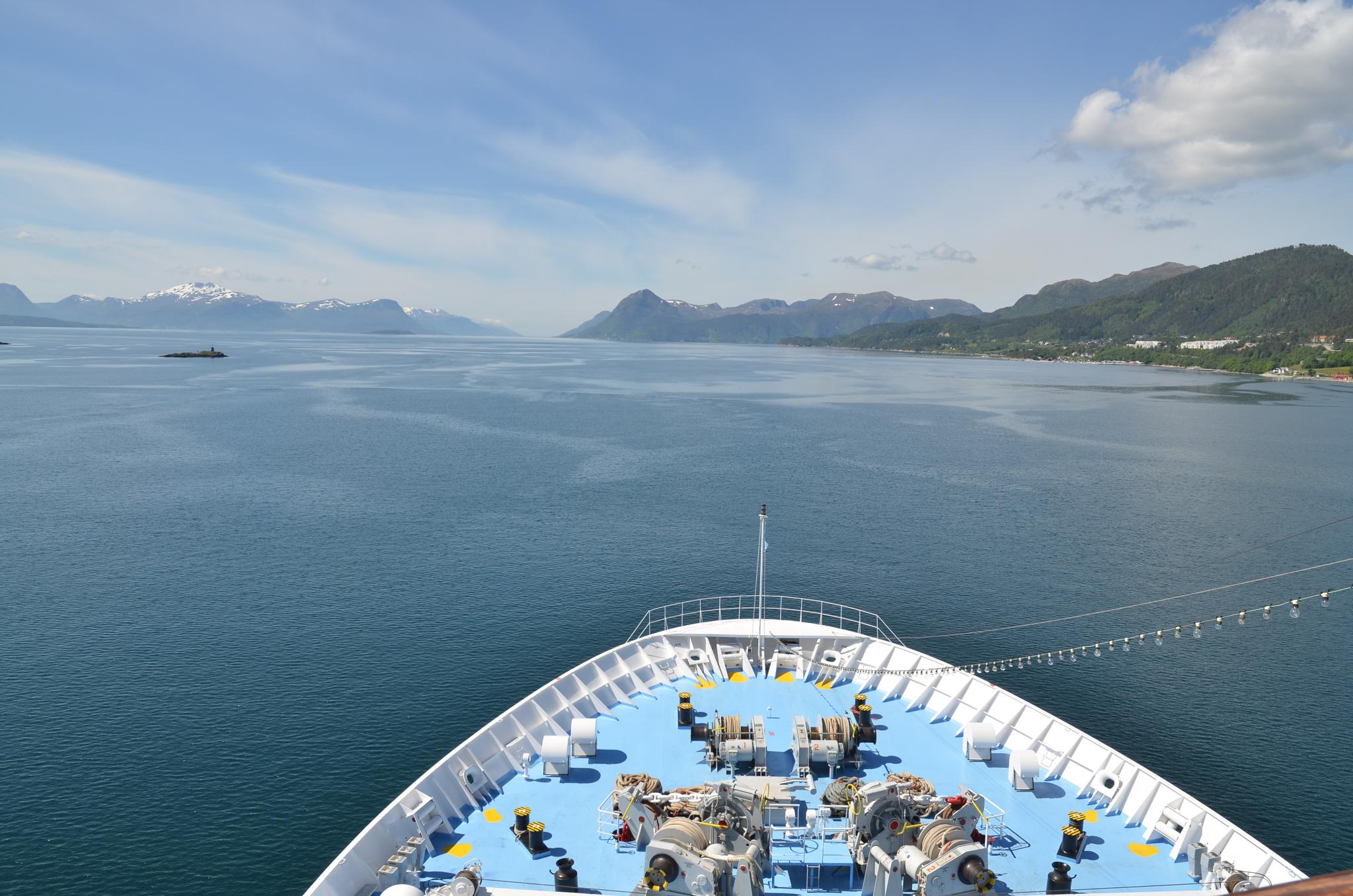 Leaving Molde